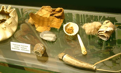 Steinzeitfeuerzeug / prehistorical lighter